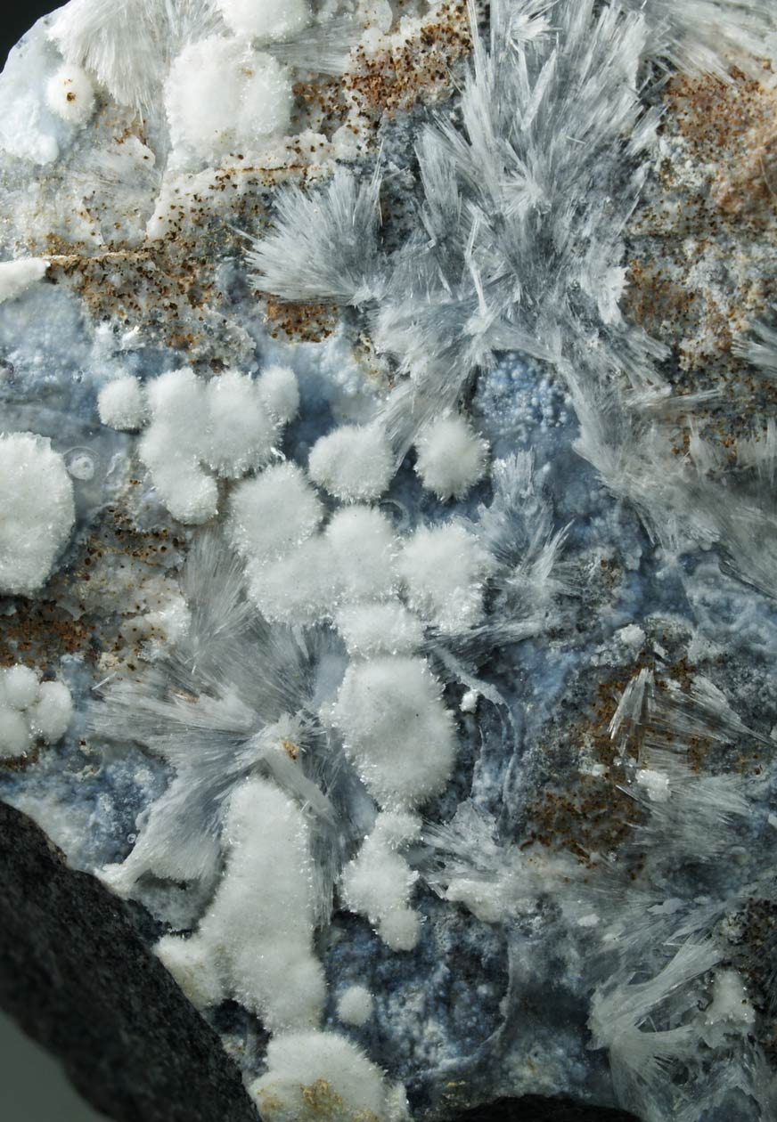 Estéticos y brillantes agregados de cristales foliáceos, formando rosetas, de intenso color blanco, aunque son incoloros, de dypingita. Se acompañan de gavillas de cristales aplanados de hidromagnesita, entre translúcidos a transparentes, incoloros (recuerdan al aragonito). Todos ellos se disponen sobre una matriz de roca recubierta de una capa con formas botroidales, de color azul a gris, de brucita. Una pieza catalana de las que hoy día cuesta encontrar, con especies poco habituales y con calidad. From: Pedrera de l'Àngel, Montseny massif, Gualba, Barcelona, Catalunya, España Medidas: 8.5 x 7.0 x 6.0 cm. Encontrado en 1970's. Ex. L. Daunis (Barcelona) Ejemplar con análisis